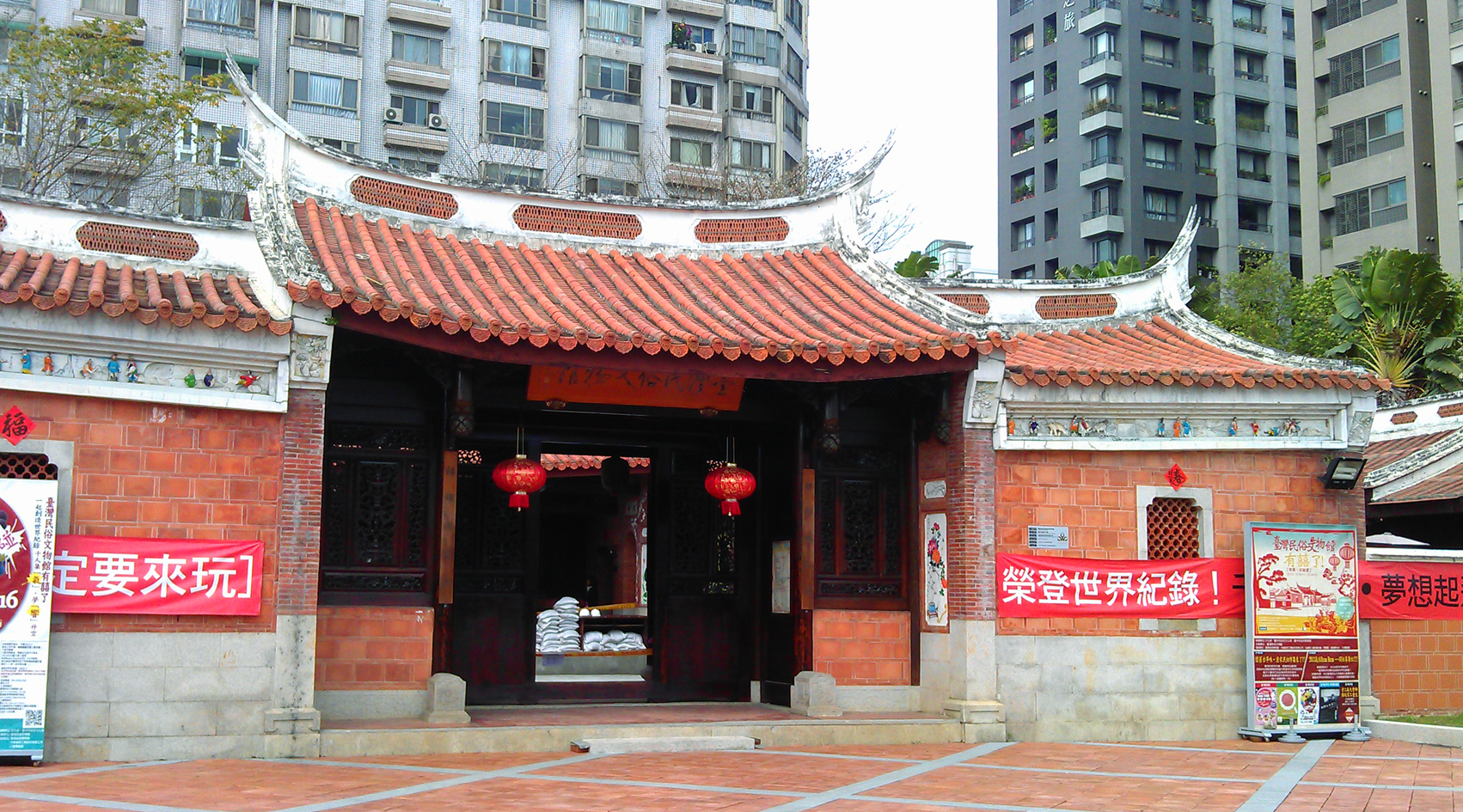 中文（台灣）: 民俗公園民俗館